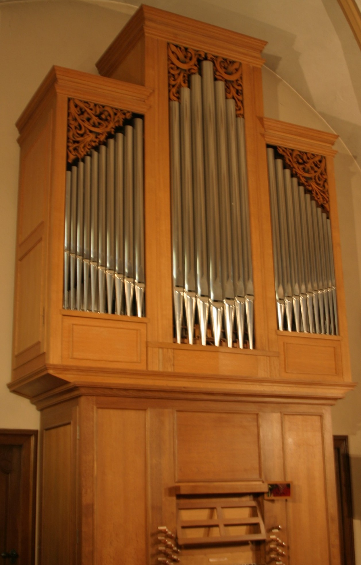 Uergel an der Kierch vu Betten op der Mess. Betten Mess Kategorie:Gemeng Dippech Betten Mess